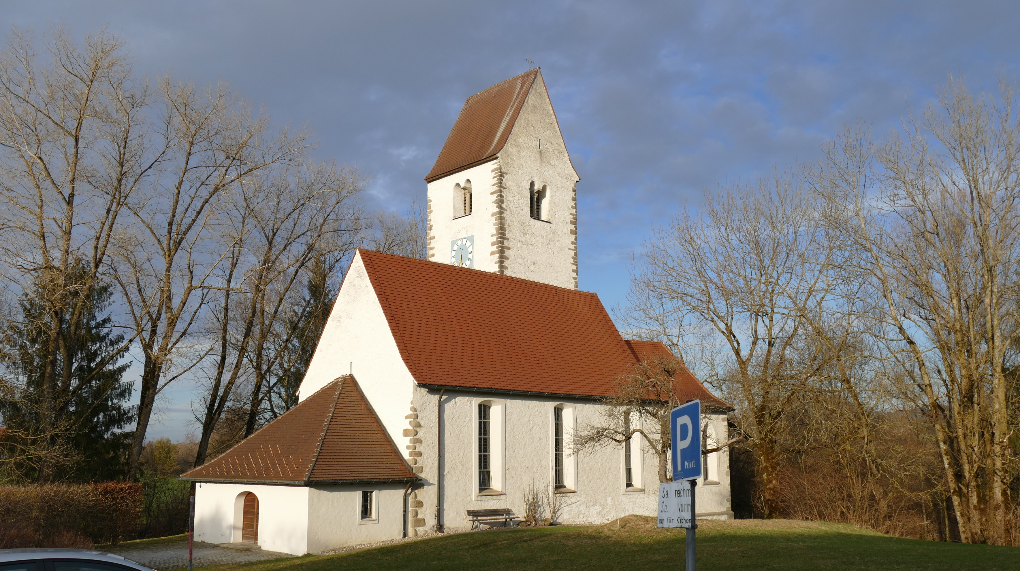 Cosmas und Damian in Rauns im Abendlicht